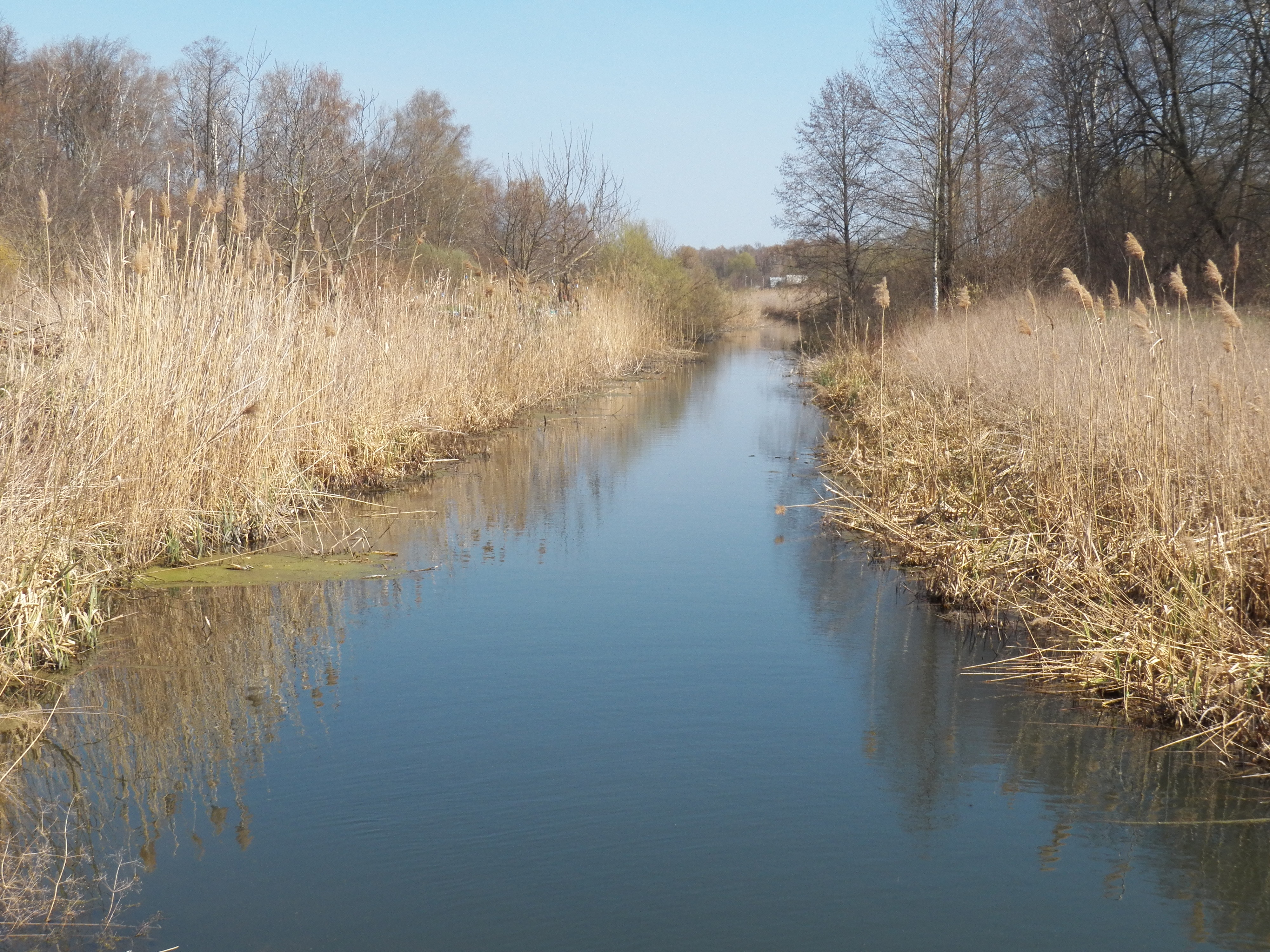 «Калитянська Дача», Броварський район, Калитянська та Заворицька сільські ради